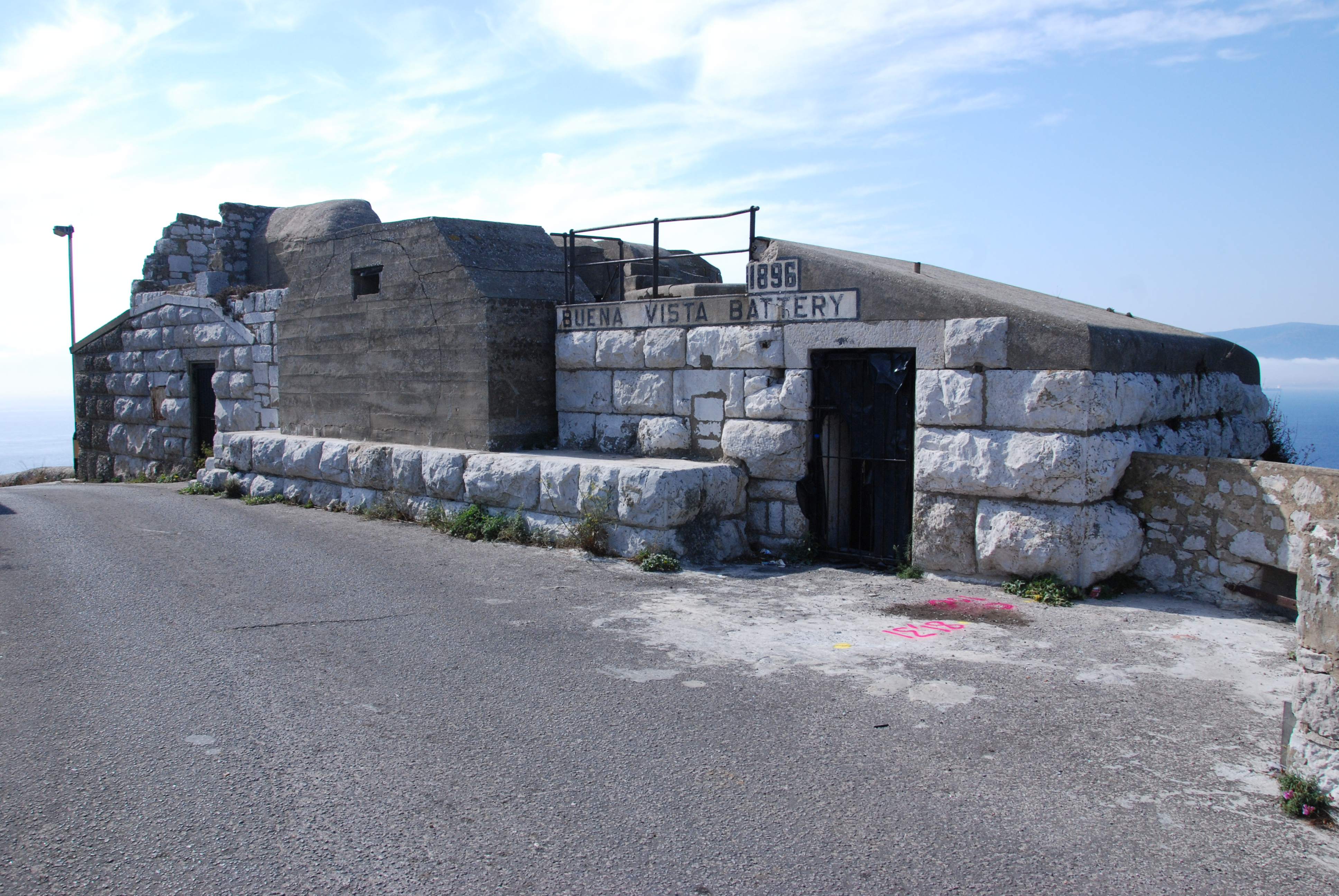 Buena Vista Battery, Gibraltar